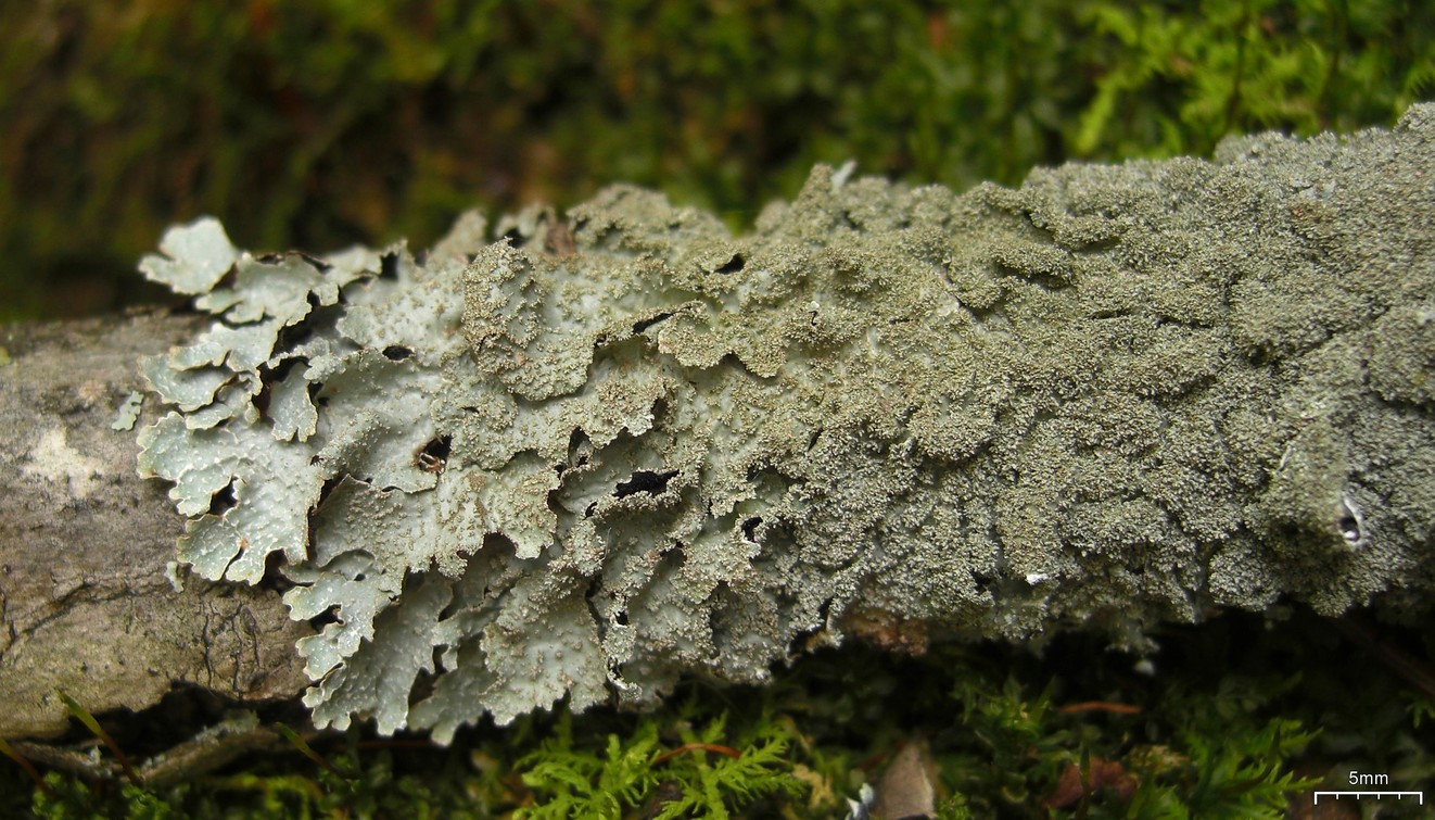 Punctelia rudecta 20091007.327 US, MD, Big Run State Park